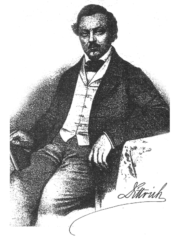 Reprodukce dřevorytiny Franze Dittricha